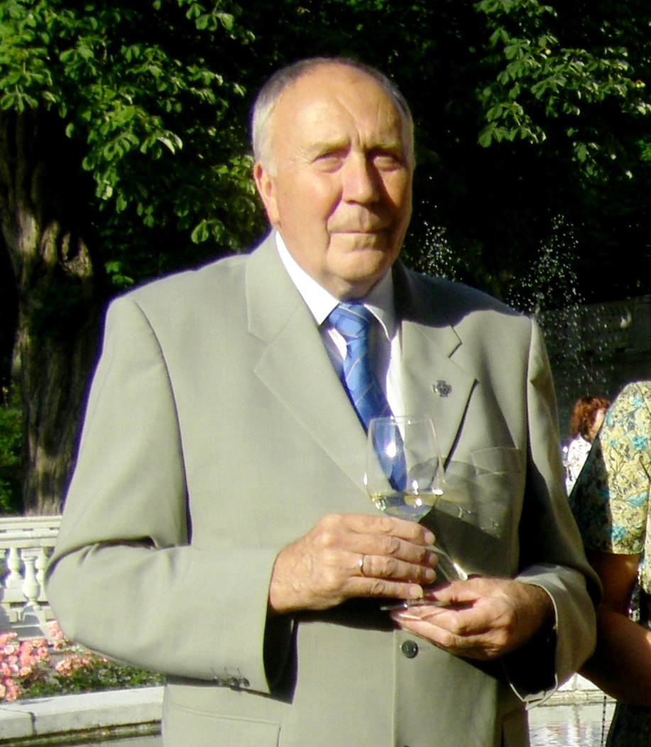 Mart Madissoon